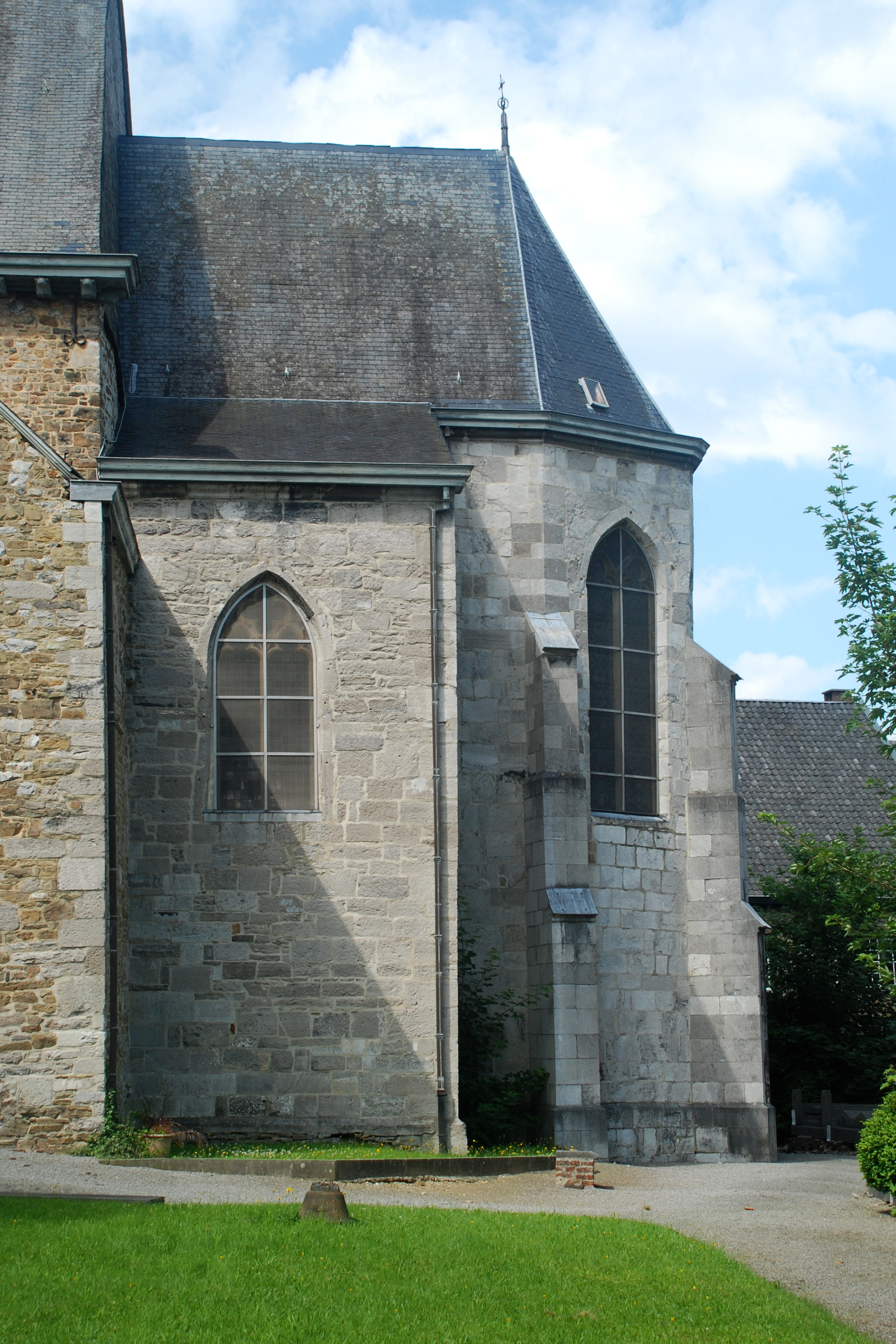 Belgique - Wallonie - Église Saints-Hermès-et-Alexandre de Theux